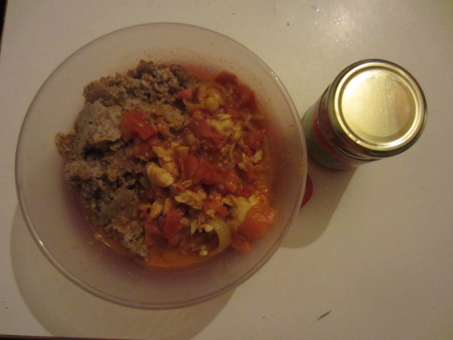 Cusine haïtienne (Haitian cuisine) : Blé sauce poisson